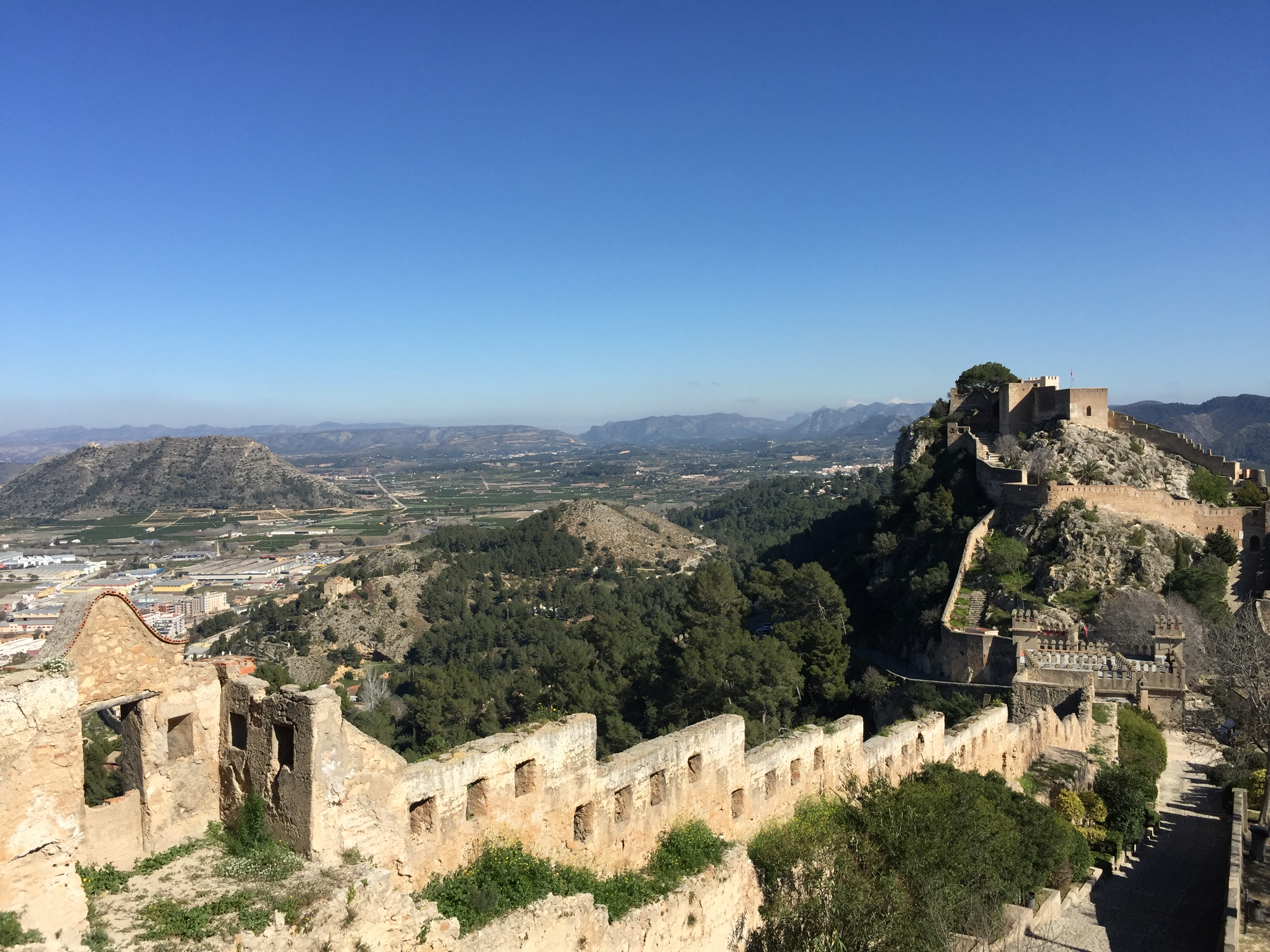 Construit sur une falaise dominant la plaine, le château de Xàtiva comporte plusieurs sections.